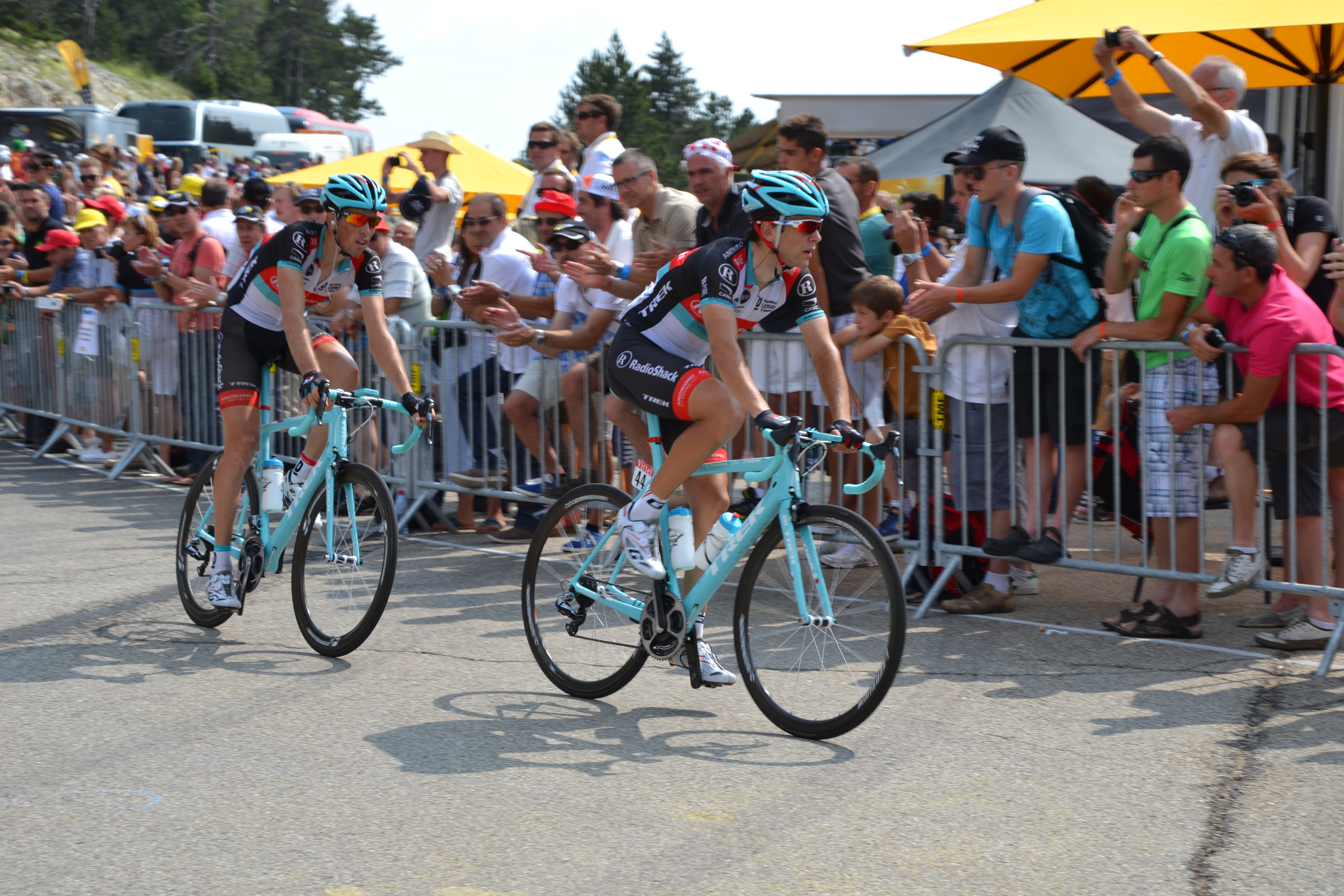 Au Chalet Reynard, lors de la 15ème étape du Tour de France 2013, le numéro 44 (à droite) est Tony Gallopin.